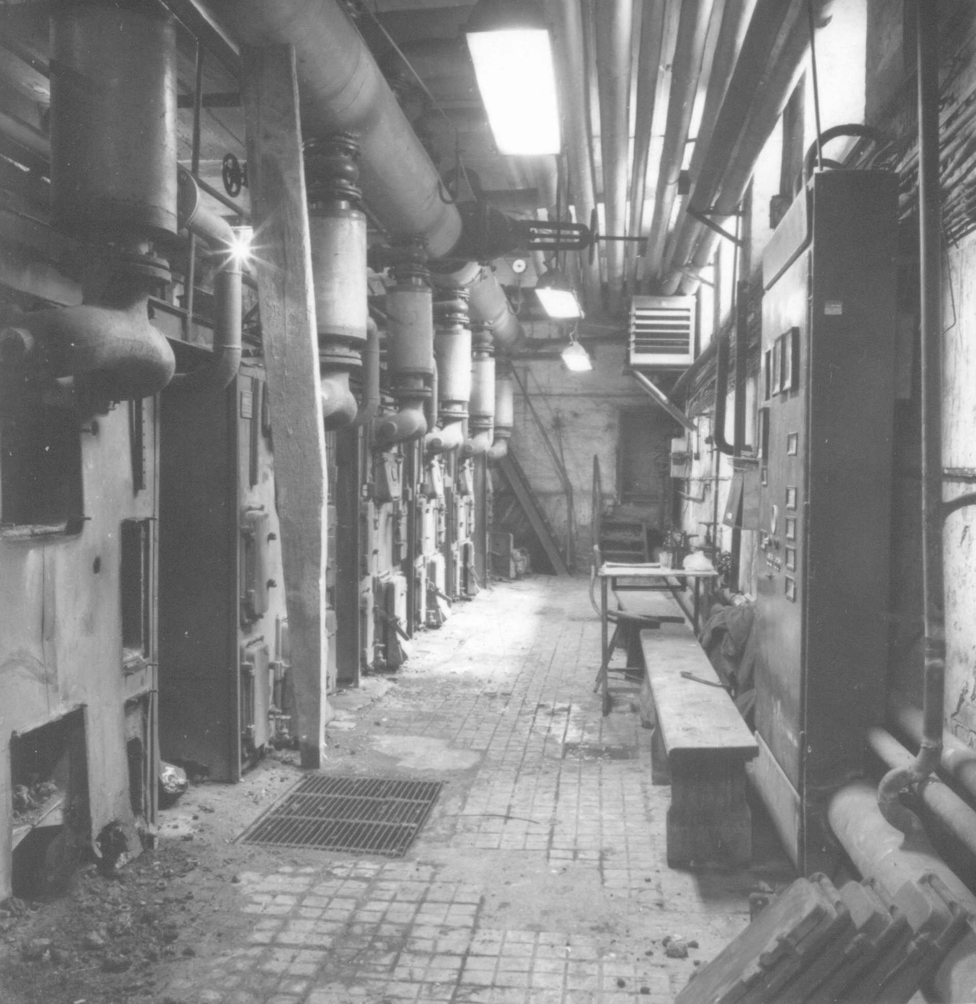 EKM gyár kazánháza